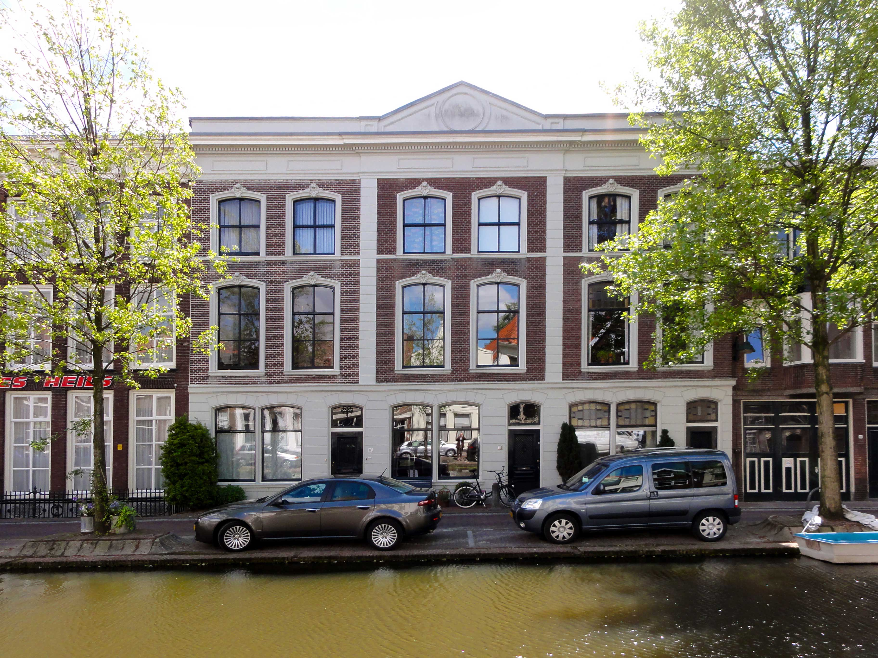 Turfmarkt 113, 115 en 117 Gouda, rijksmonument